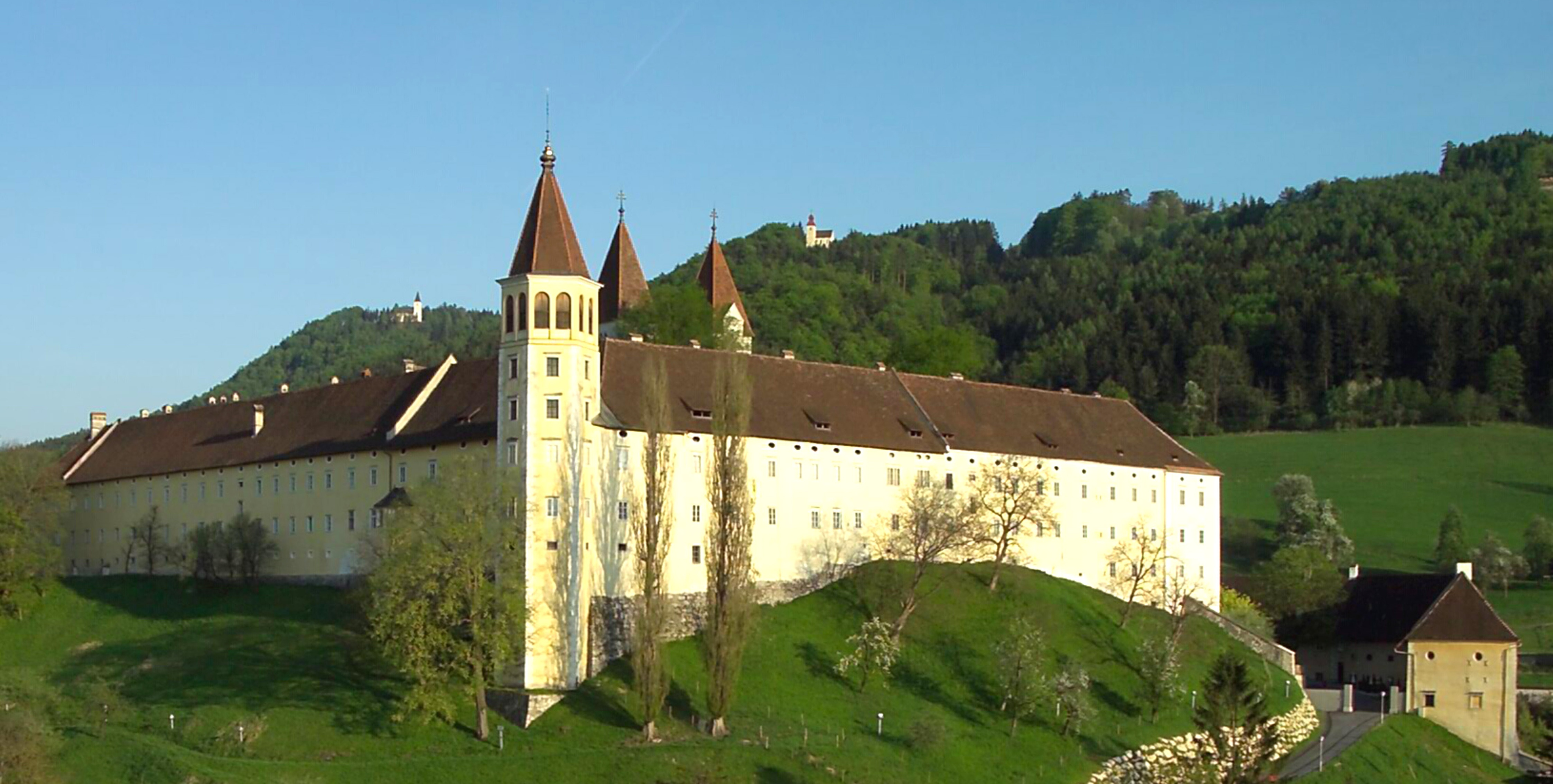 Stift St. Paul im Lavanttal